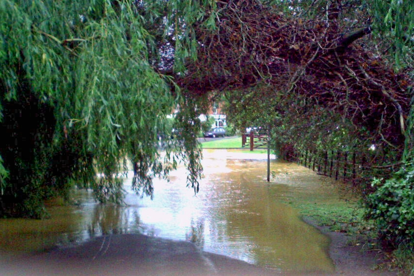 Tetford Flood